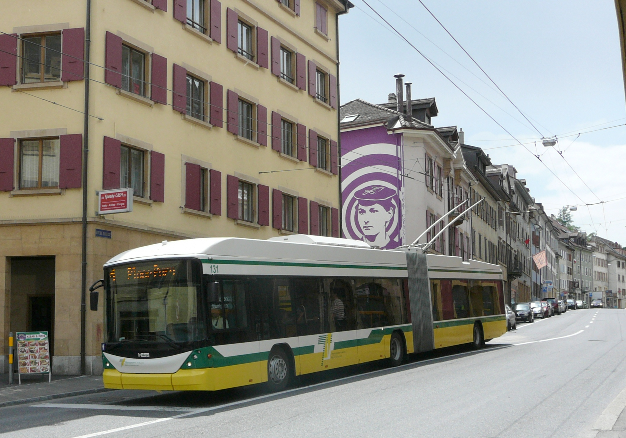 Trolleybus Swisstrolley 3 n° 131 de Hess à la station Ecluse sur la ligne 1